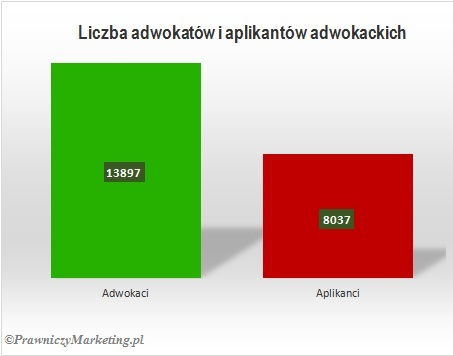 Diagram prezentuje liczbę adwokatów i aplikantów adwokackich w Polsce w oparciu o dane z Krajowego Rejestru Adwokatów i Aplikantów Adwokackich oraz dane Głównego Urzędu Statystycznego na dzień 04.05.2015 r.